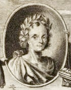 Portrait Carl Desiderius de Royer mit Dichterkranz, Ausschnitt aus dem Titelblatt seines Epigrammwerkes Musarum juvenilium